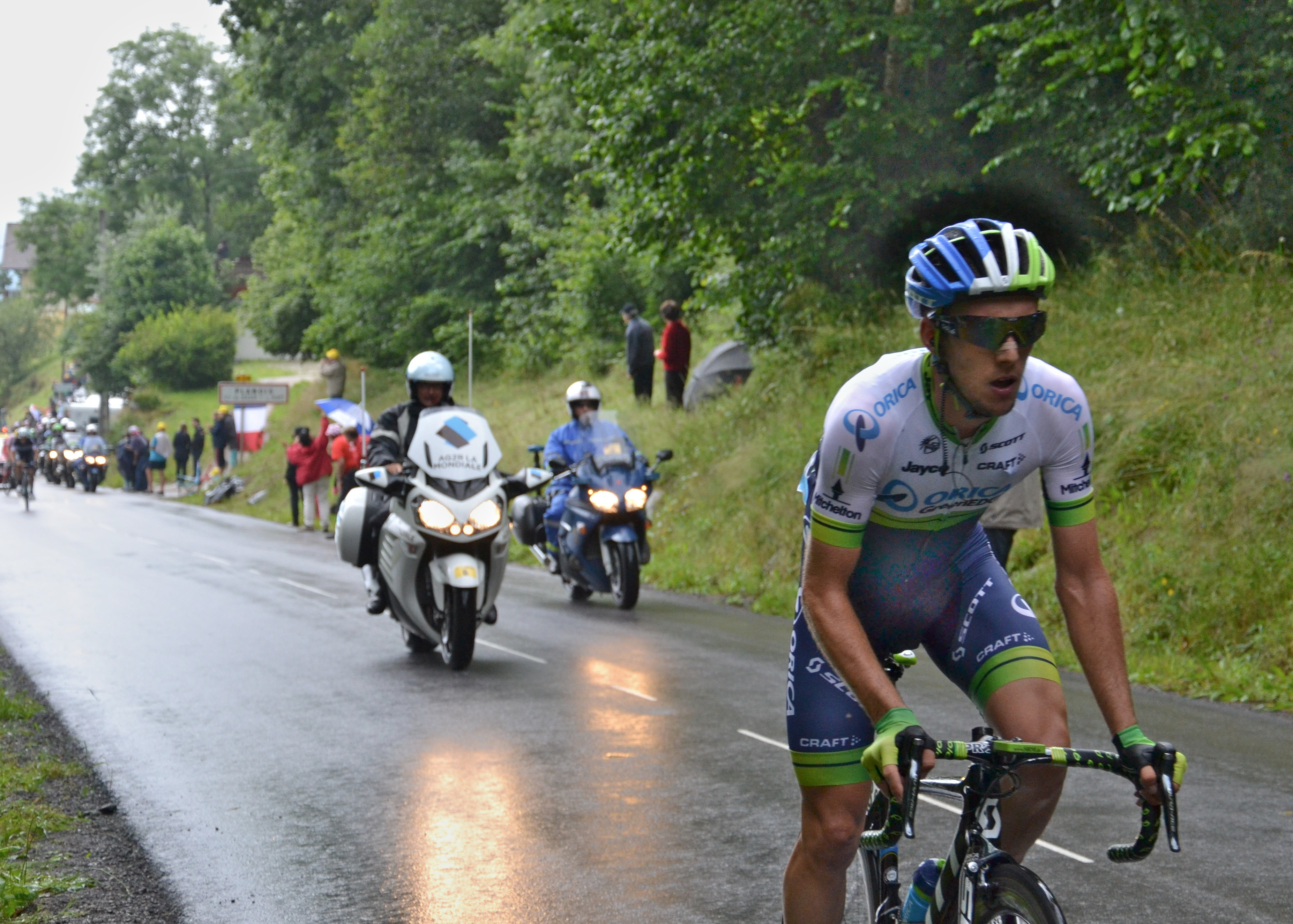 Simon Yates dans la montée du col de la Croix des Moinats.